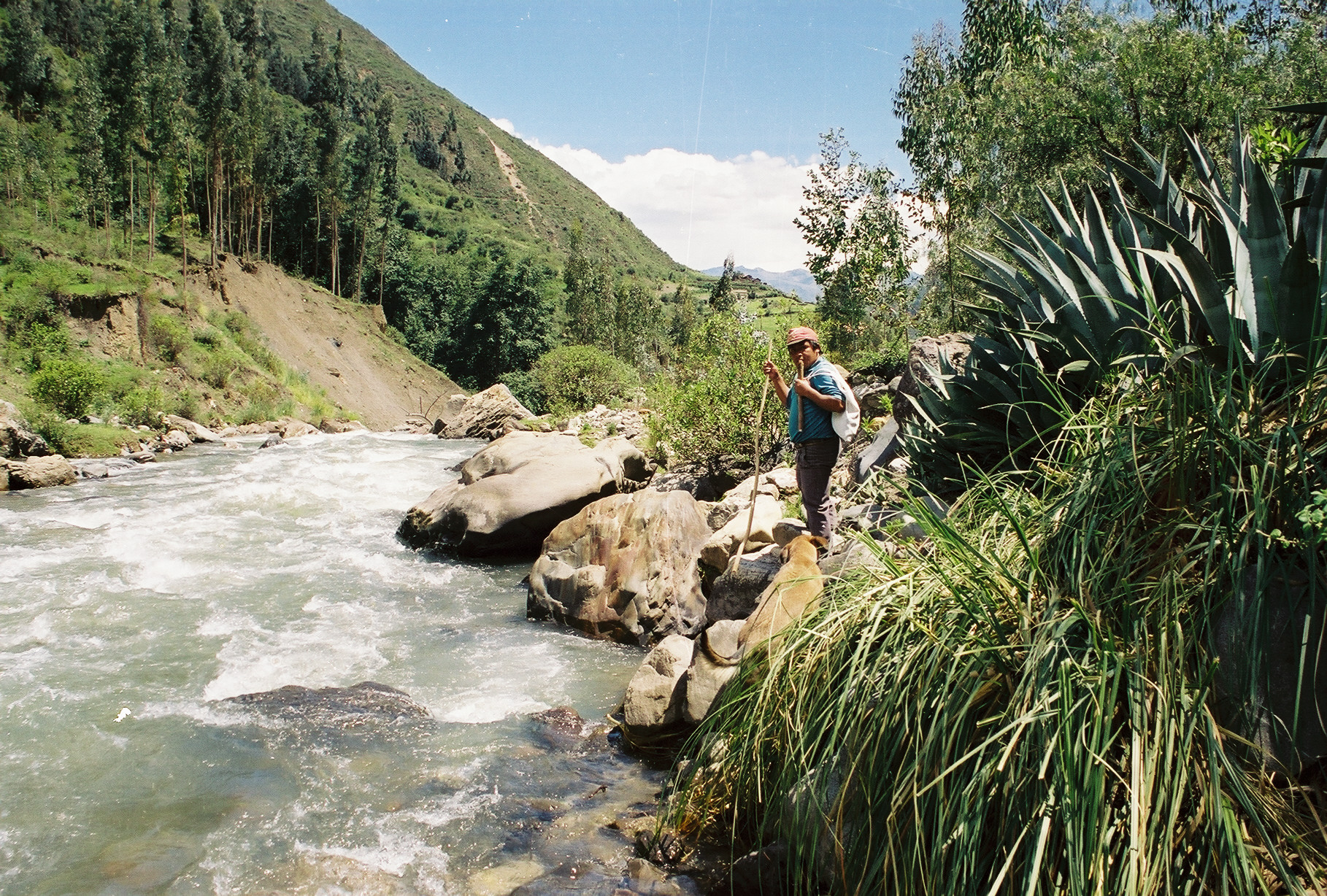 Río Ainín im Valle de Pativilca/Tal des Pativilca auf der Höhe von Chiquián/Peru im Jahre 2001 von Uta Freund